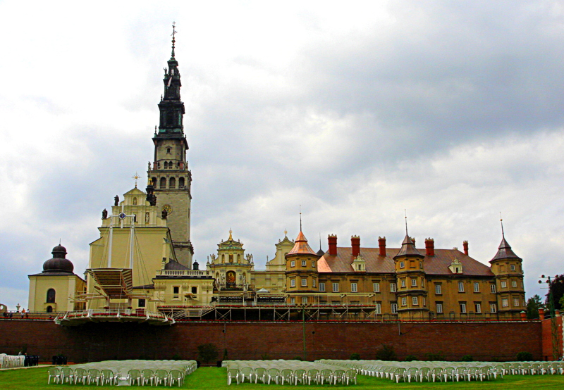 Częstochowa - zespół klasztorny oo. Paulinów: Kościół pw. Wniebowzięcia NMP i Znalezienia Krzyża Św. z kaplicami, zakrystią, skarbcem, wieżą, klasztorem, zabudowaniami gospodarczymi, arsenałem, drukarnią, domem muzykantów, twierdzą z bramami i bastionami, park (zabytek nr A-12/78 z 17.02.1978)